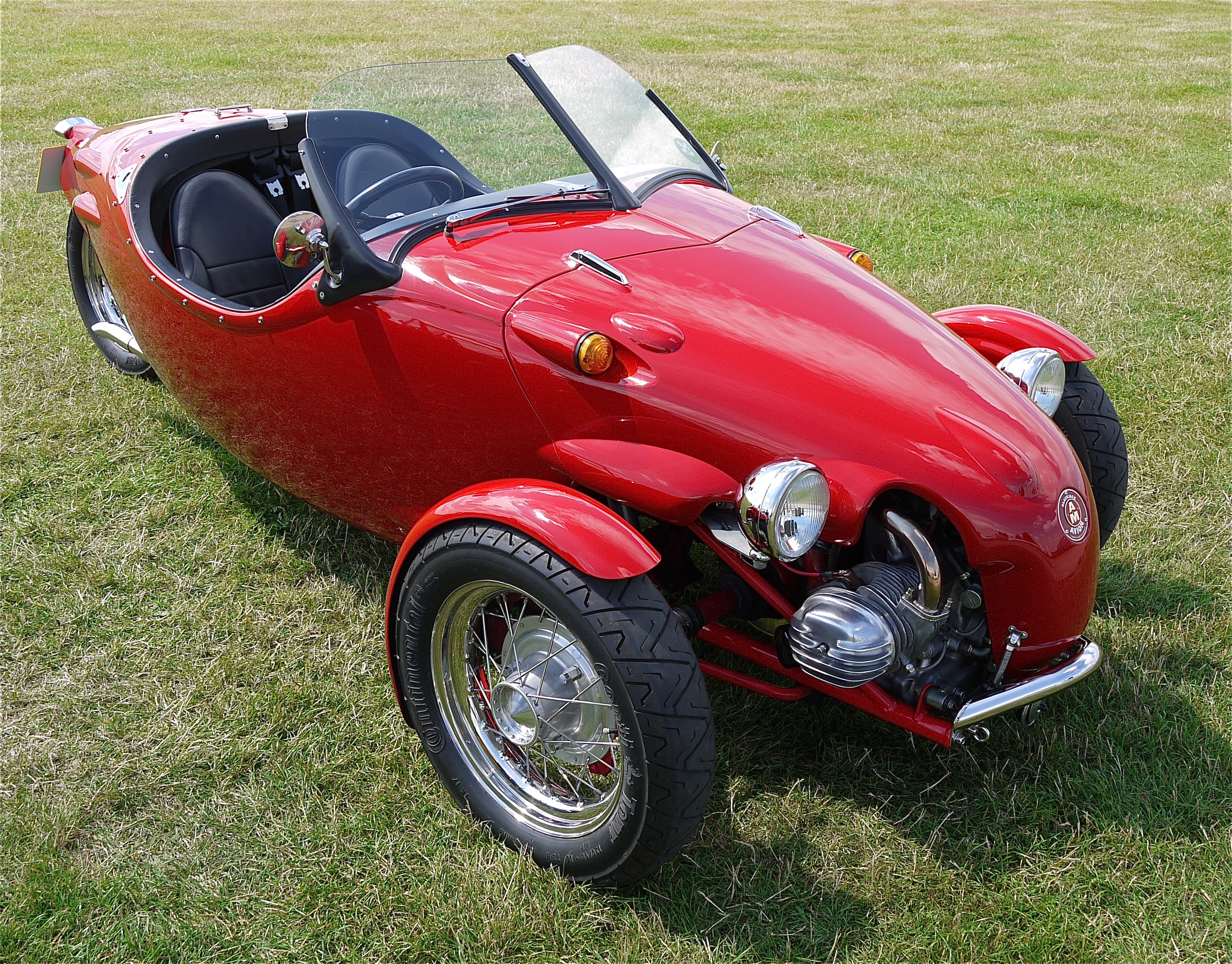 Panasonic G1 14-45 Lens